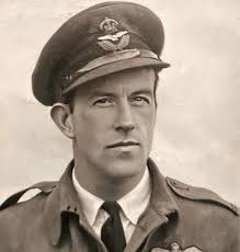 Jean de Selys Longchamps (1912-1943) image tombée dans le domaine public